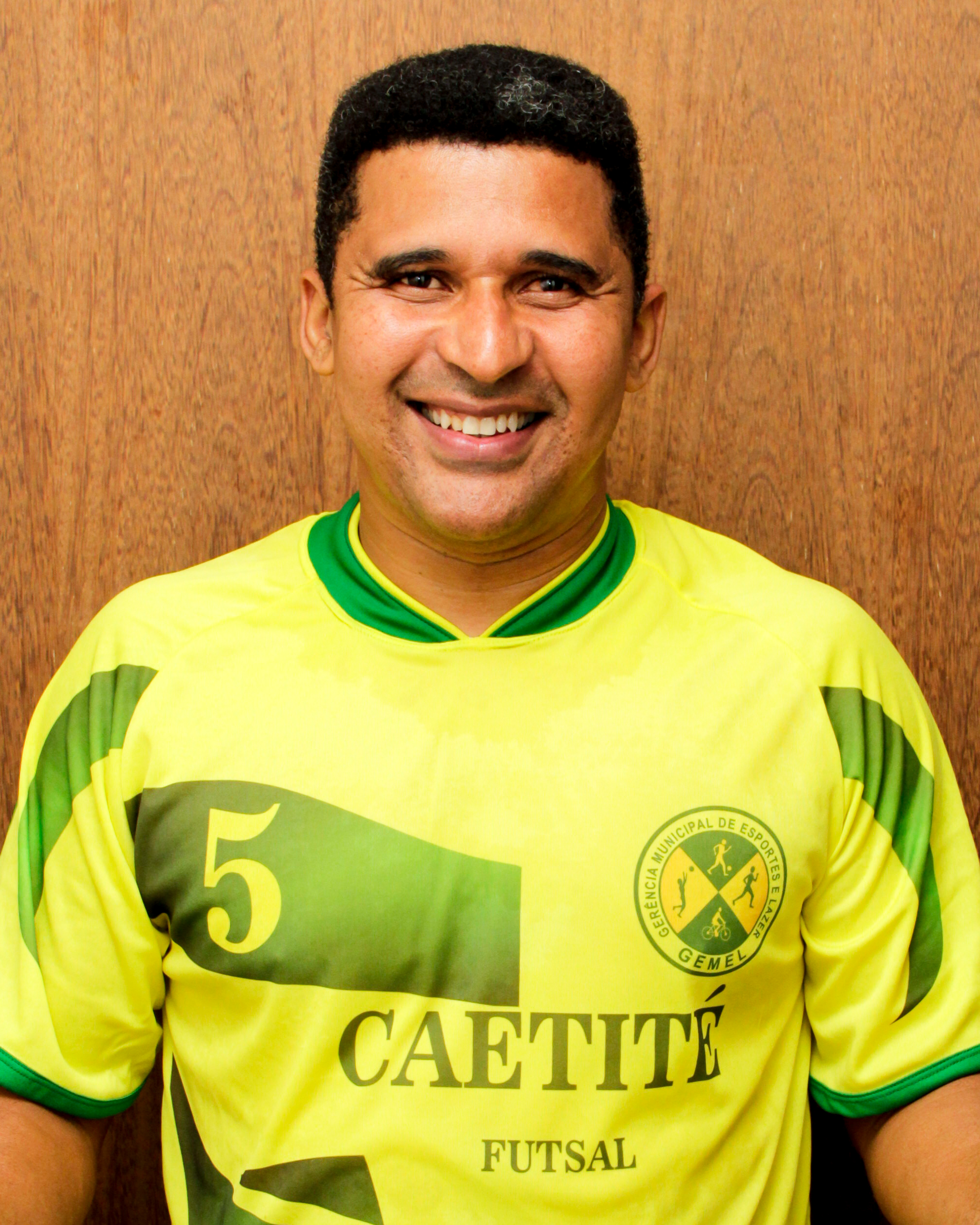 O jogador de futsal brasileiro Manoel Tobias, durante partida amistosa pela seleção máster de Caetité contra a seleção máster de Igaporã, 11 de junho de 2016. Tobias assinalou dois dois na vitória de Caetité por 5 x 2.